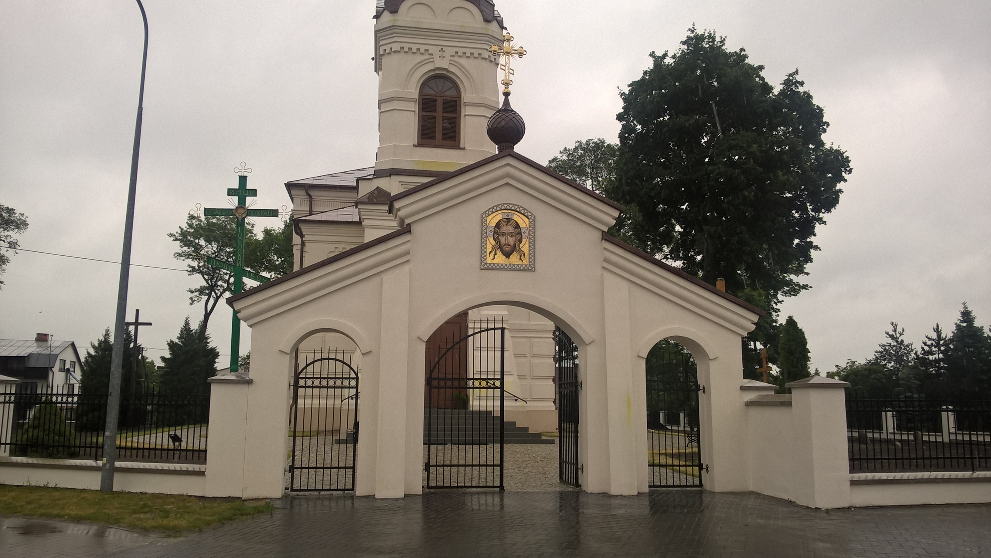 Cerkiew Opieki Matki Bożej w Kobylanach, brama wjazdowa na teren cerkiewny